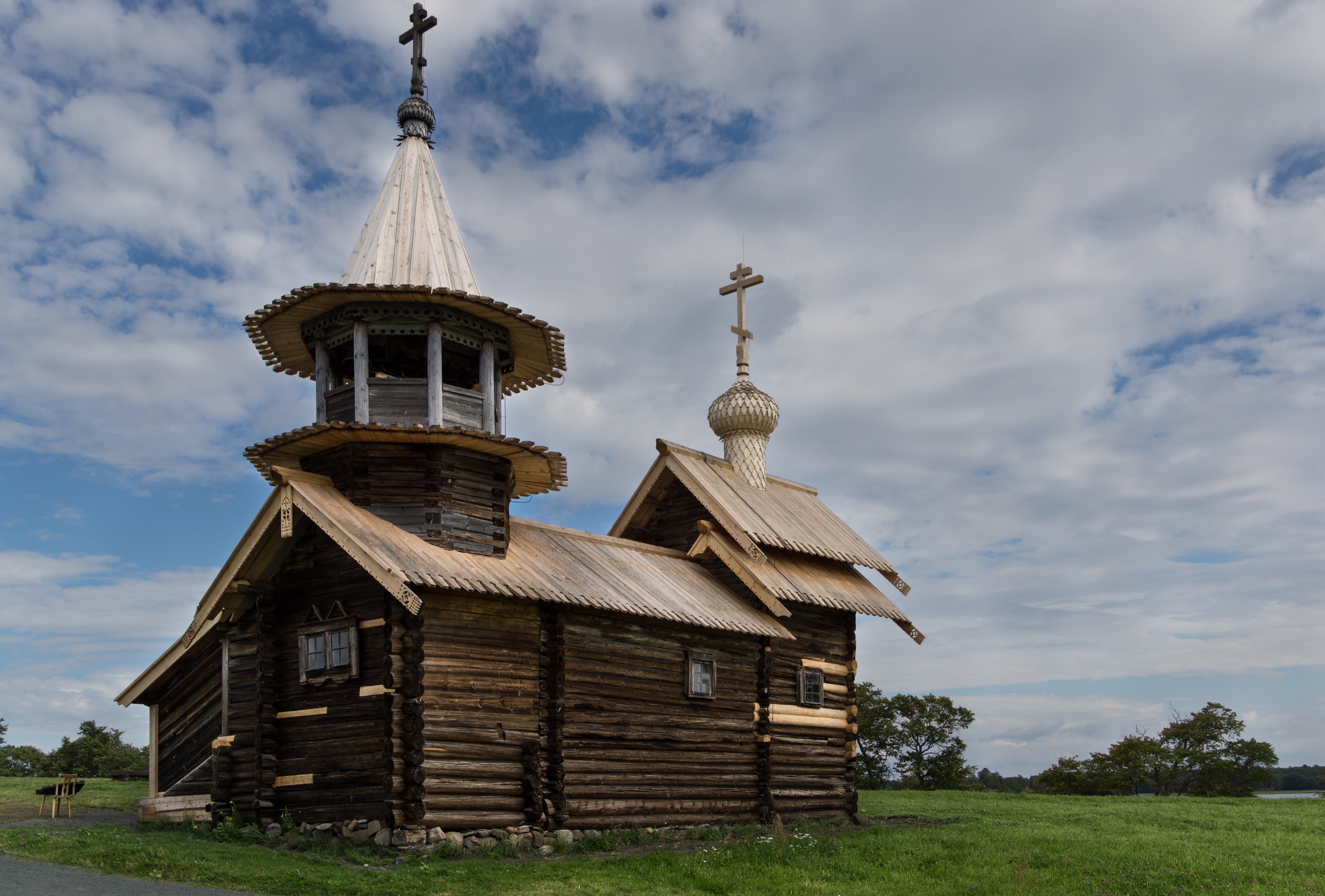 Часовня Михаила Архангела. Музей-заповедник деревянного зодчества "Кижи"